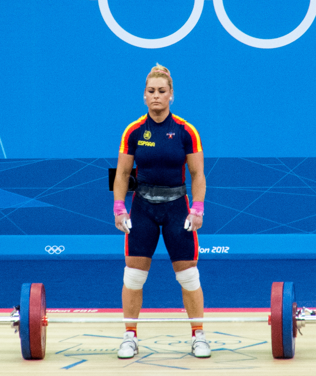 Lidia Valentín, 2012 Olympics